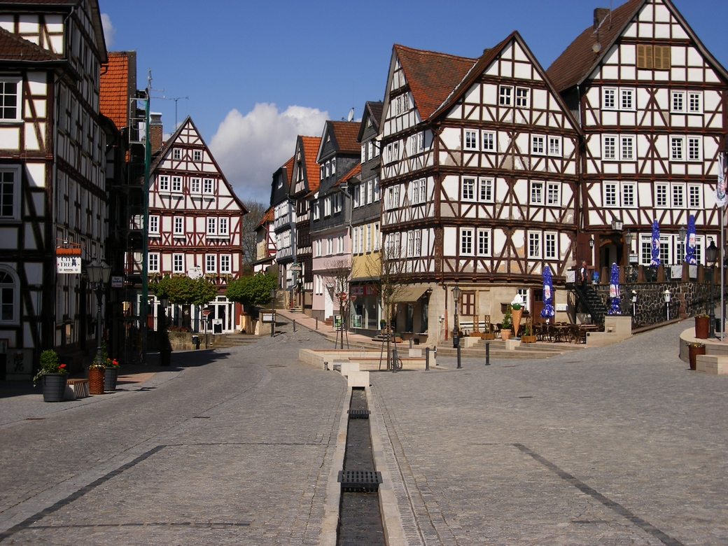 Blick mit Rinne auf die neugestaltete Brunnenanlage